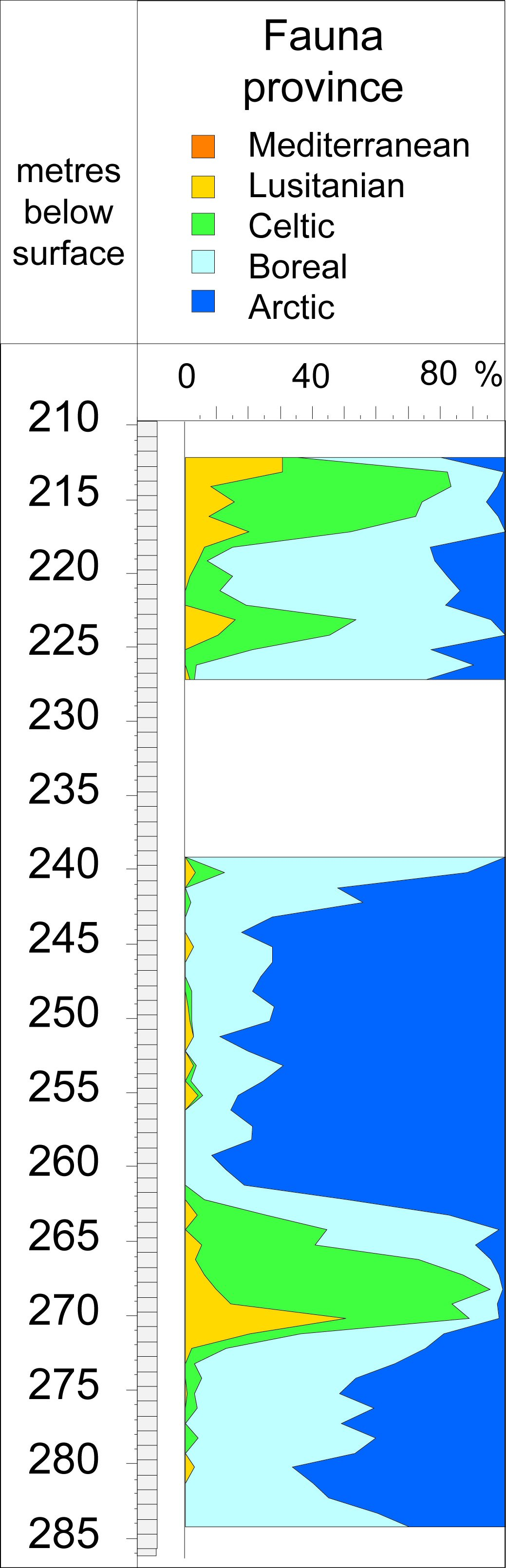 Borehole Noordwijk, Netherlands; Pretiglian; marine molluscan climate